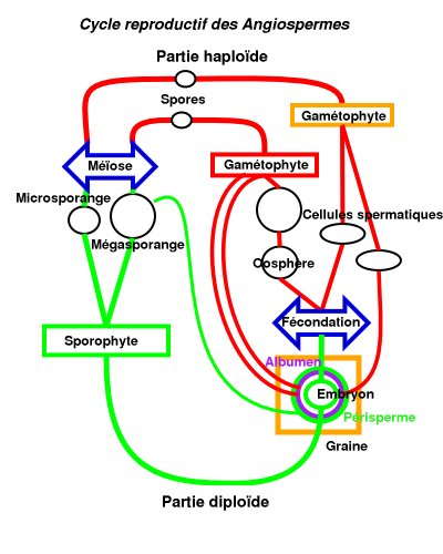 cycle végétatif type d'un angiosperme.